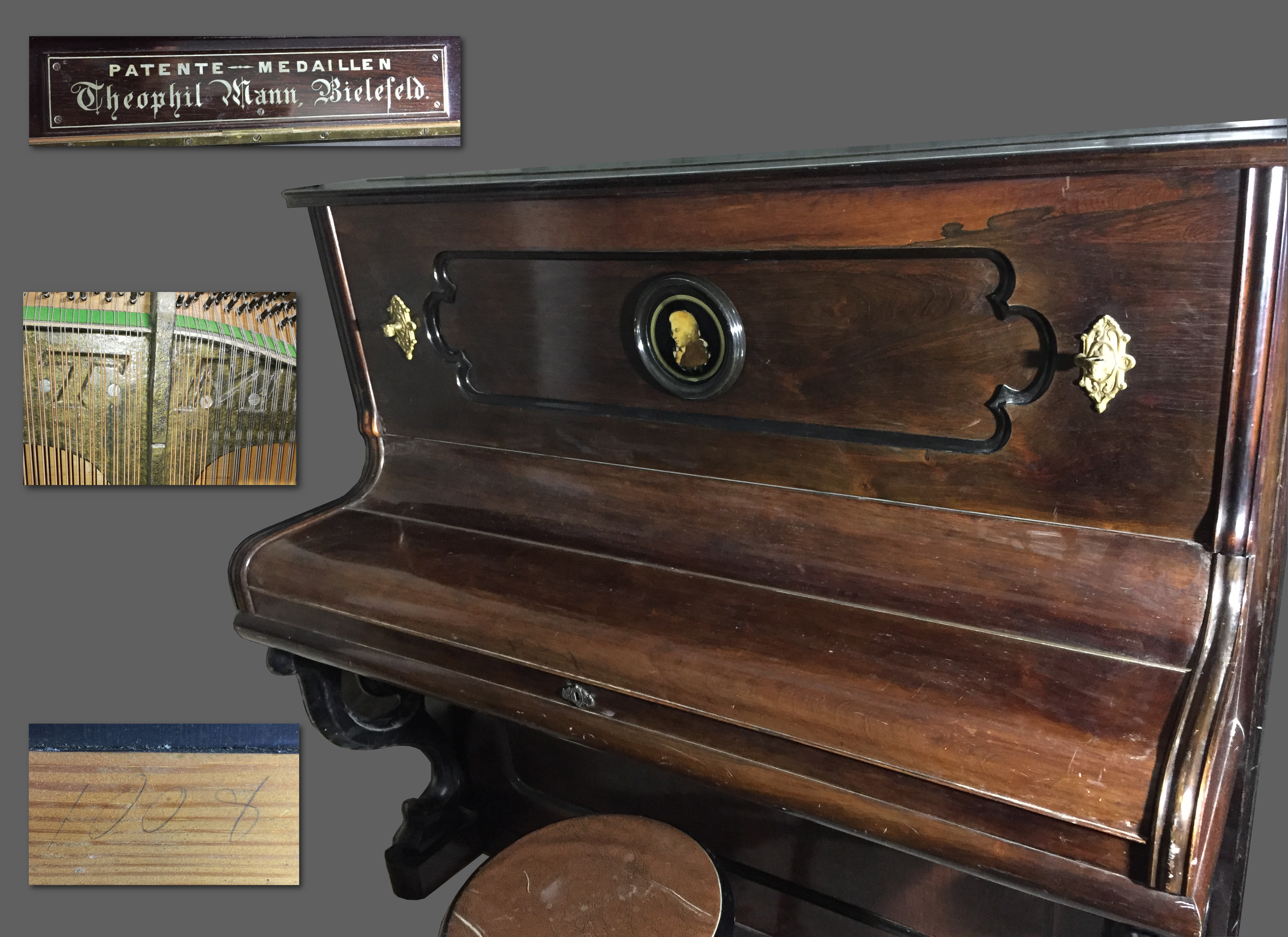 Klavier von Theophil Mann mit handschriftlich vermerkter Seriennummer 1008, hergestellt um 1873 und ausgestattet mit patentiertem Stimmstock.